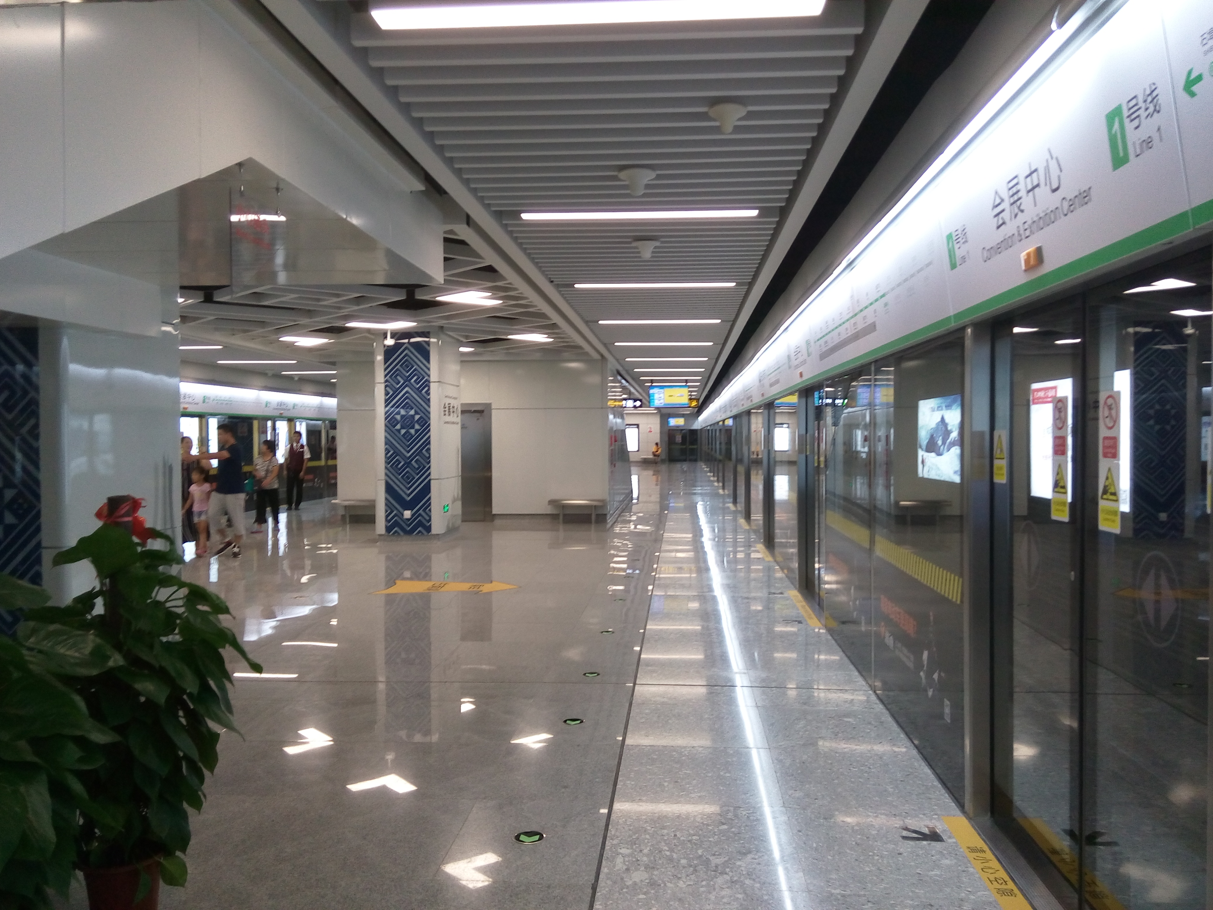 中文（中国大陆）: 南宁轨道交通